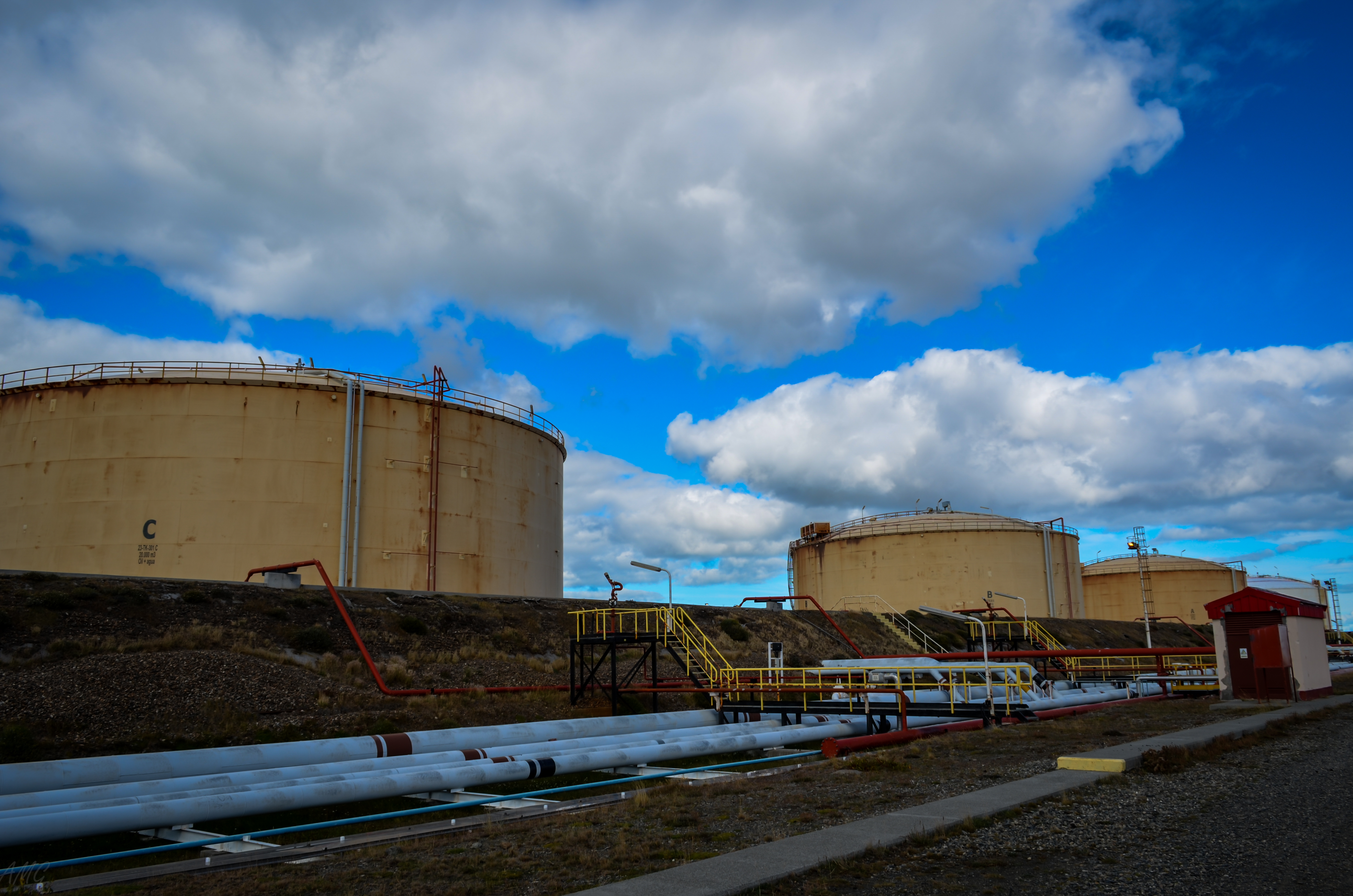 Tanques de almacenamiento de petroleo en la planta Río Culln de Total Austral